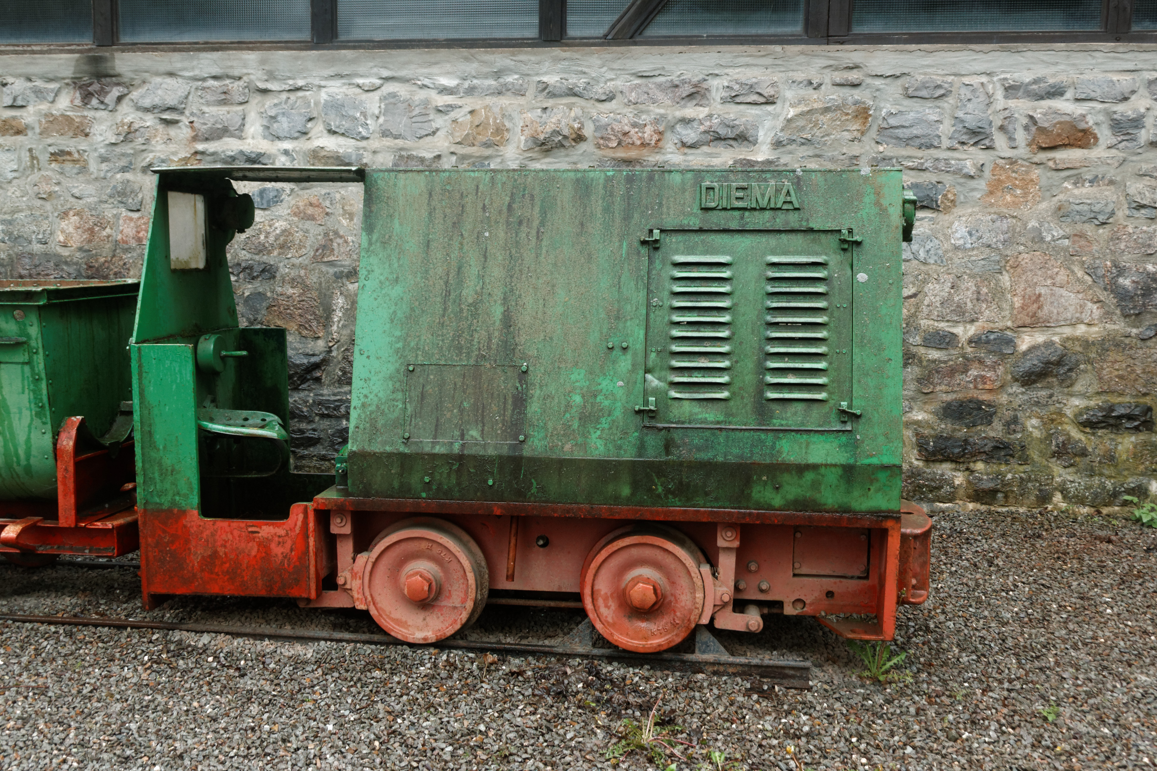 Grubenbahn "Diema" vor dem Besucherbergwerk Grube Christiane